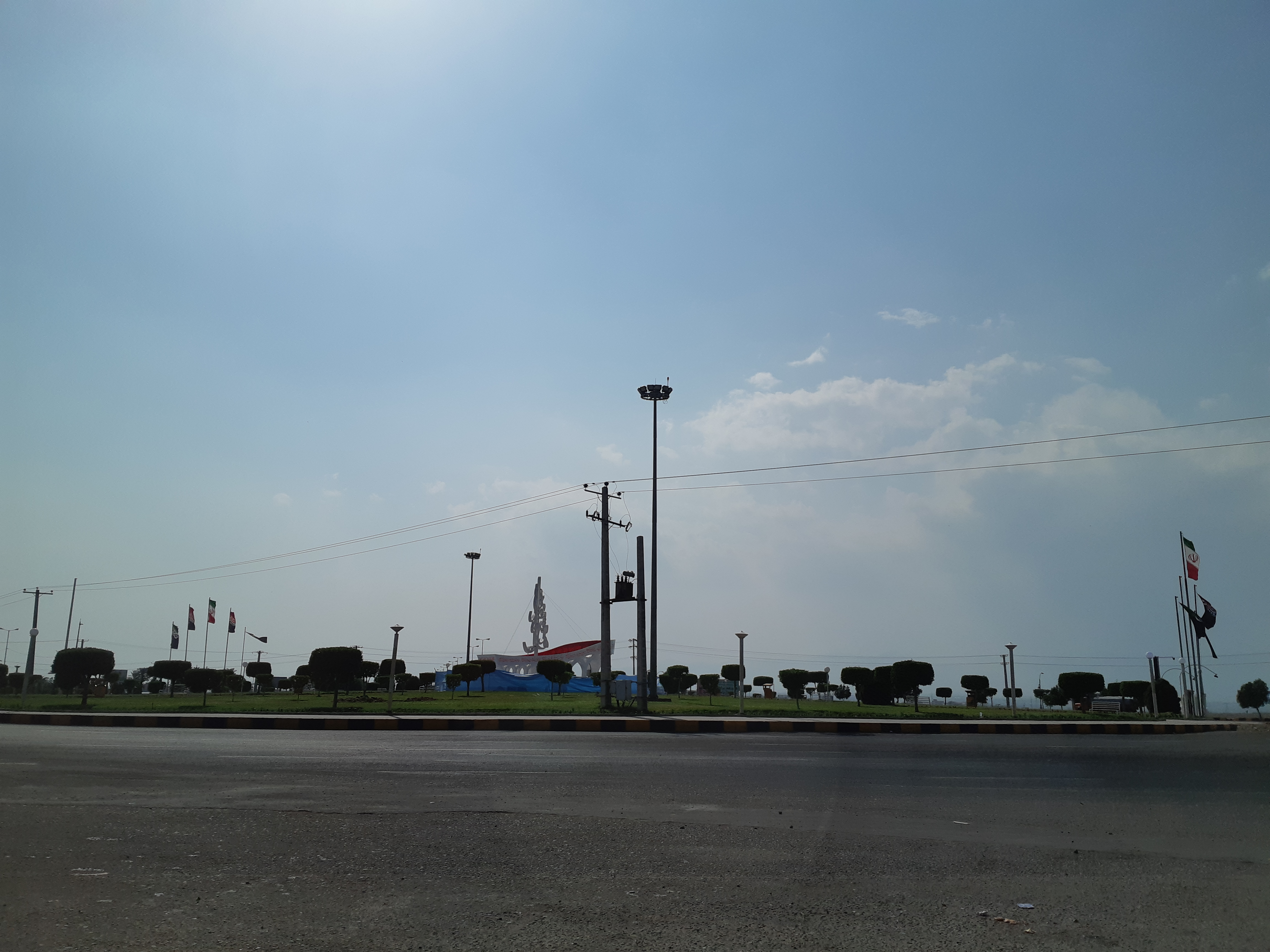 یک میدان در ورودی شهر جیرفت